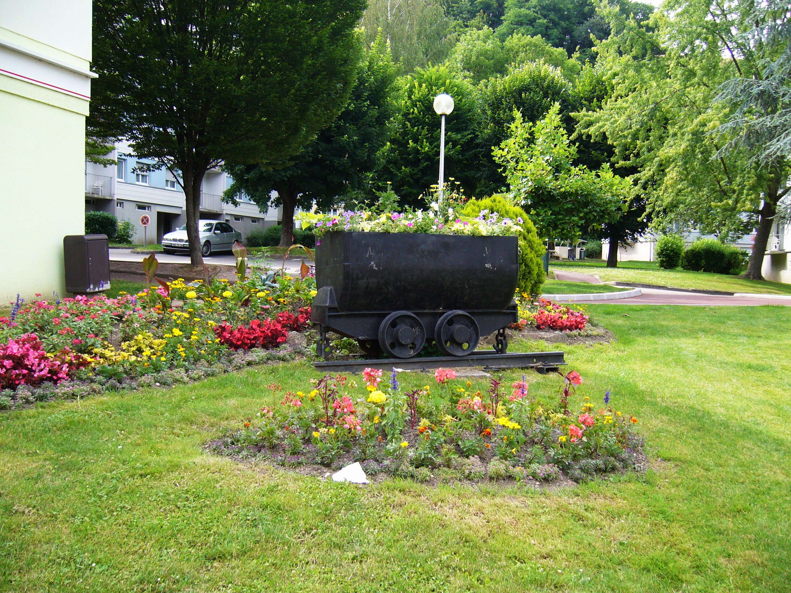 la tour des mineurs à Echéry datée du 16e siècle